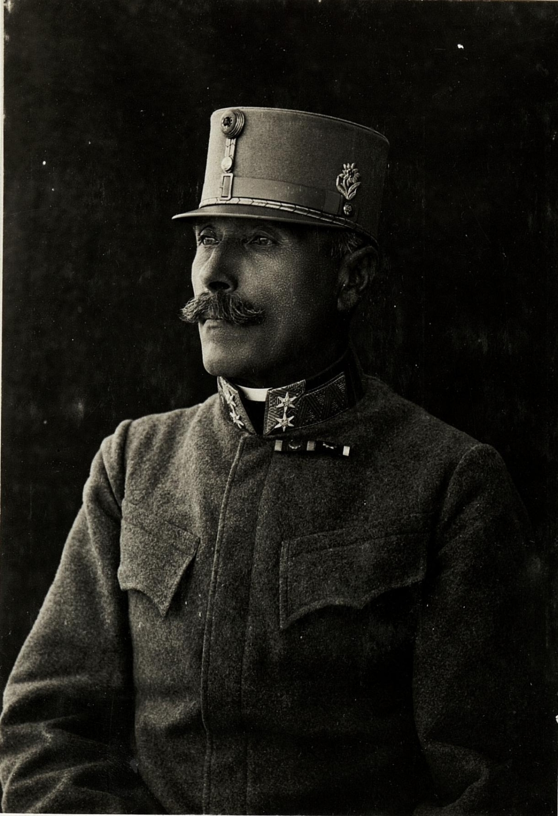 General Ignaz Verdroß-Droßberg, Kommandant der Kaiserjäger-Division